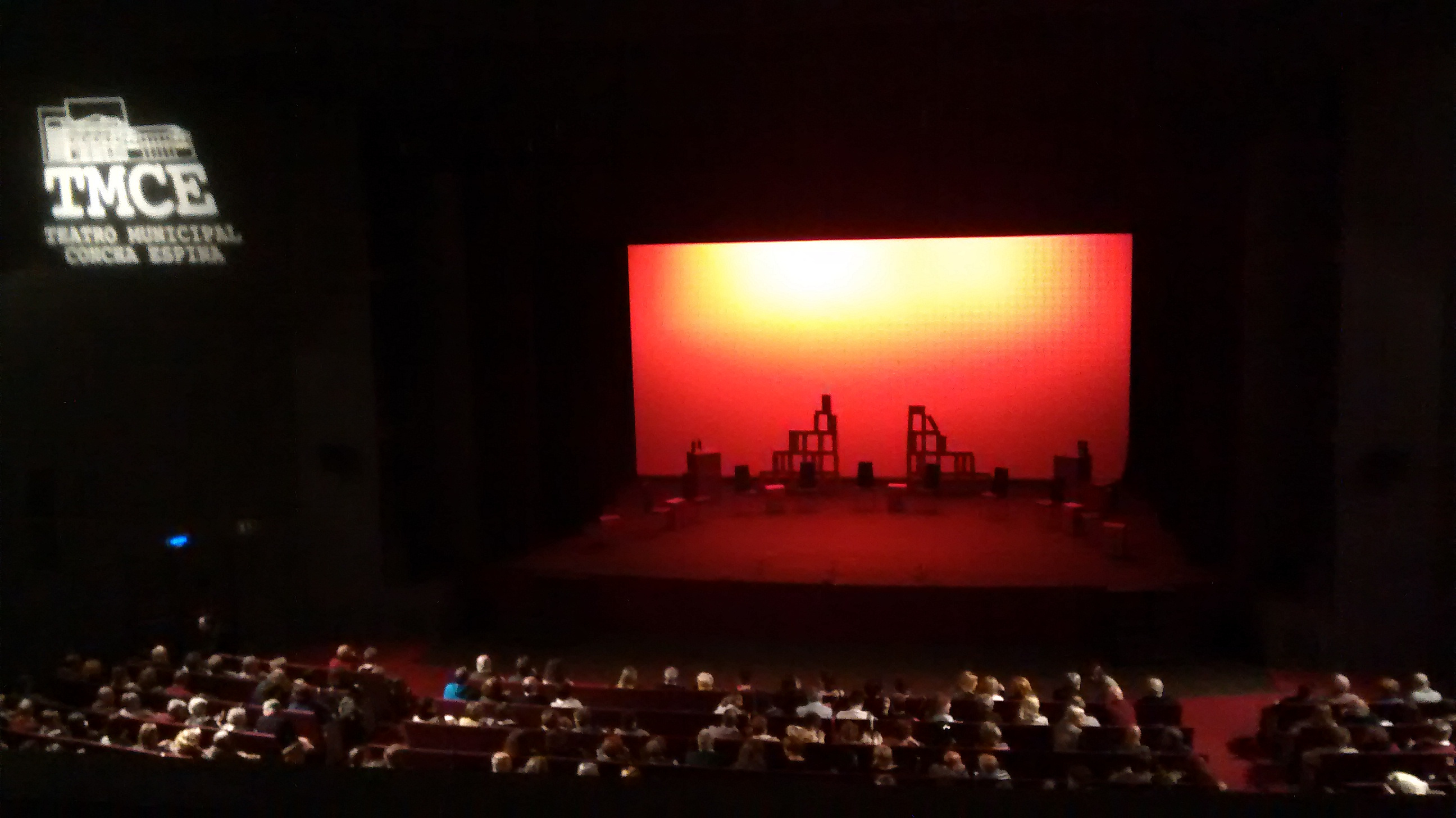 Interior del Teatro Concha Espina de Torrelavega (Cantabria, España) visto desde el palco central.